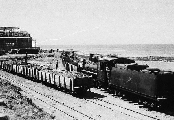 Coche Baldwin trocha 75 cm saliendo de Comodoro hacia Rada Tilly.